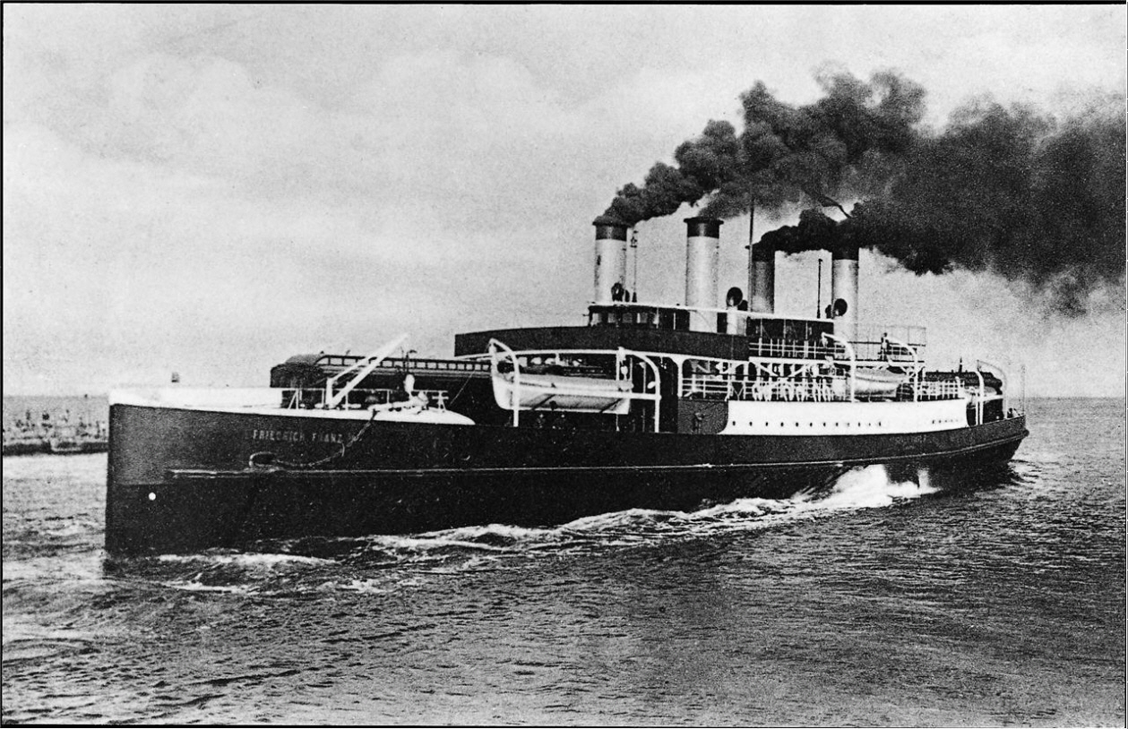 Eisenbahnfährschiff Friedrich Franz IV, Baujahr 1903, Dampf-Schaufelrad-Antrieb, Reederei der Großherzoglich Mecklenburgische Friedrich-Franz-Eisenbahn (M.F.F.E), Fährlinie Gedser-Warnemünde, verschrottet 1926.